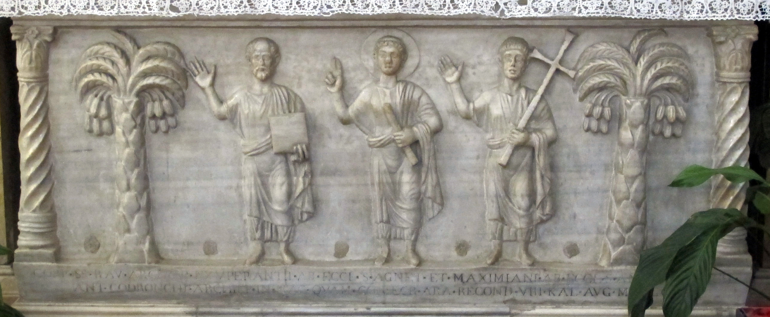 Duomo di ravenna, int., altare fatto con urna di sant'esuperanzio 2